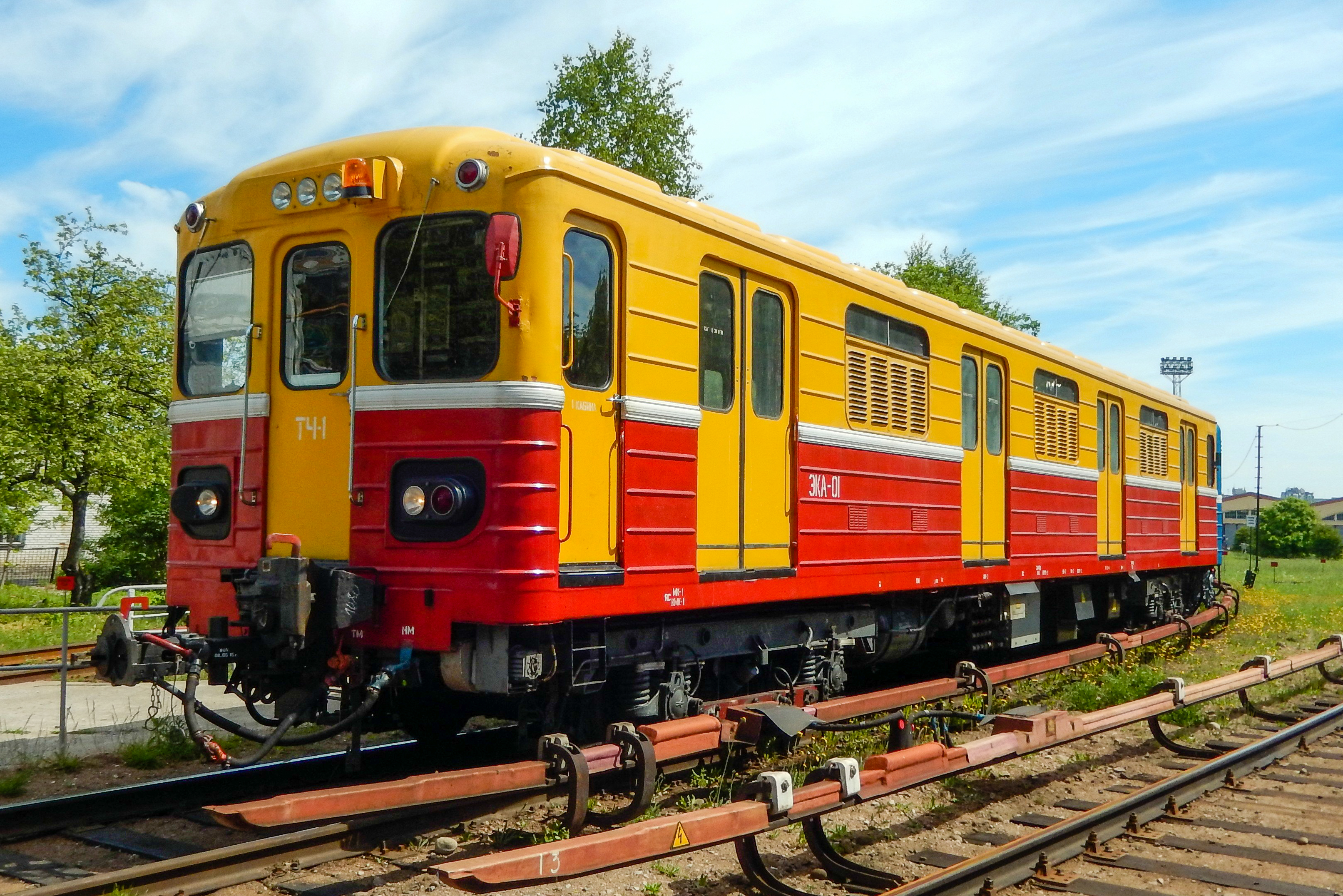 Электровоз 81-581-01 на въезде в электродепо Автово Петербургского метрополитена